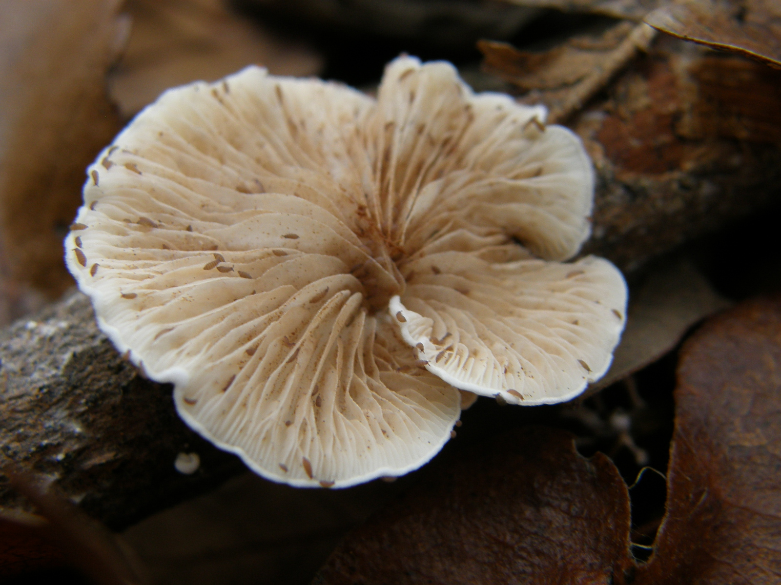 A változékony kacskagomba novemberi csemege a lárváknak.